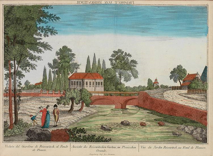 Plauenscher Grund, Reisewitz'scher Garten: Ansicht des Reisewitschen Gartens im Plauischen Grunde, Guckkastenblatt, kolorierter Kupferstich bei Joseph Carmine, Augsburg um 1780